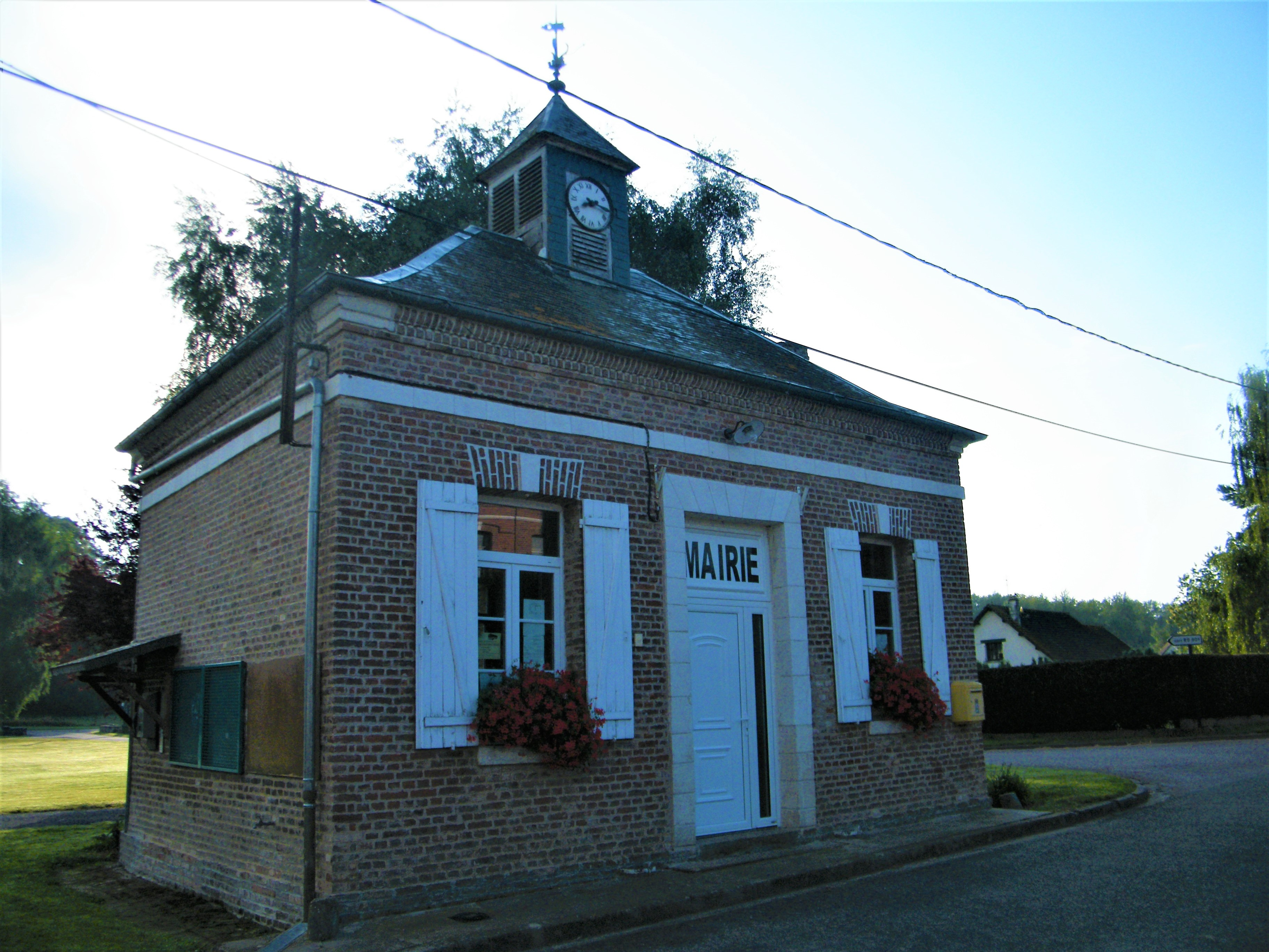 Mairie de Laleu, Somme, France.